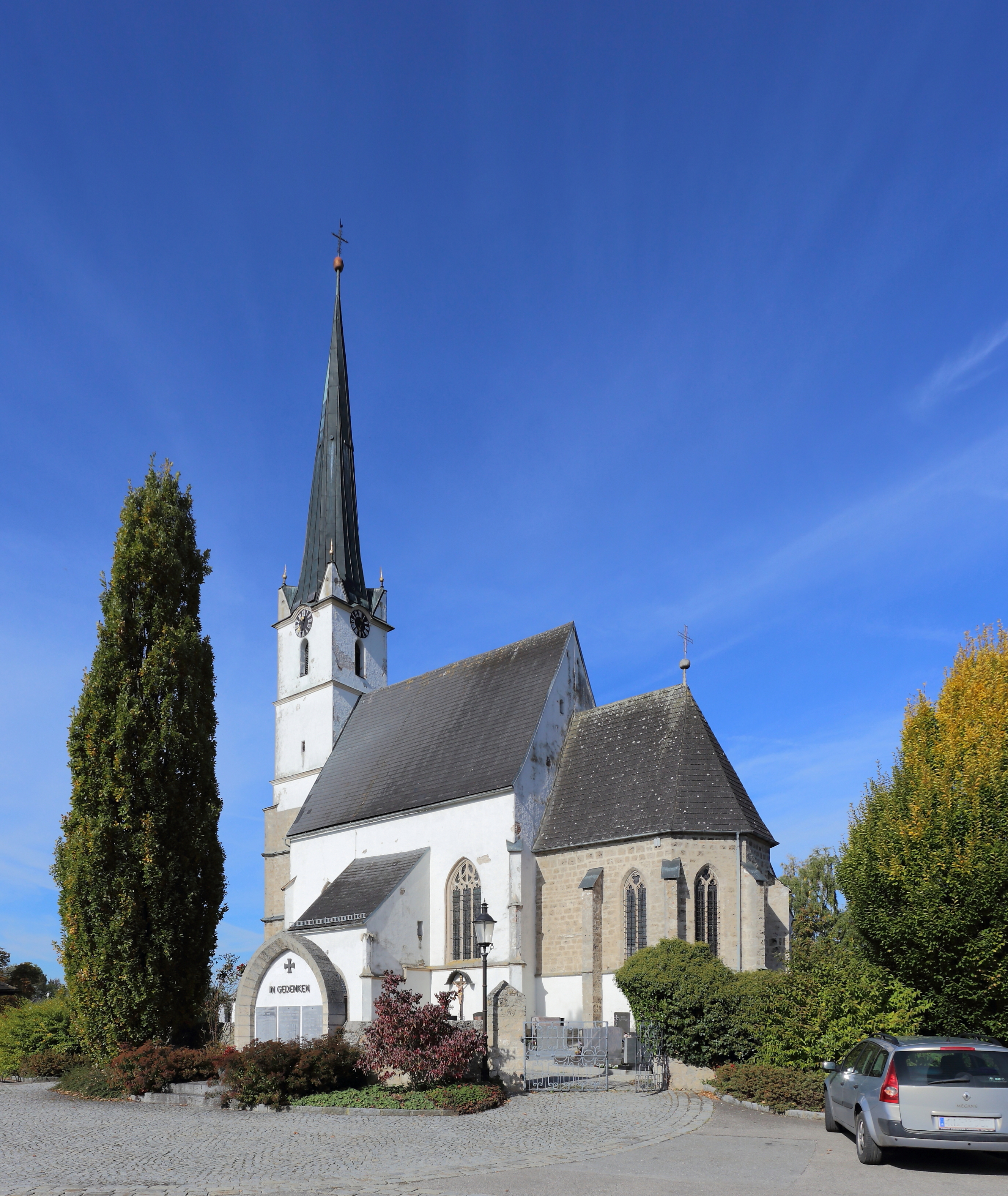 Südostansicht der katholischen Pfarrkirche Mariä Himmelfahrt in der oberösterreichischen Gemeinde Mühlheim am Inn. Ein gotischer Sakralbau um 1500 mit einem Westturm, einem einschiffigen, dreijochigen Langhaus und einem eingezogenen, niedrigeren Chor.